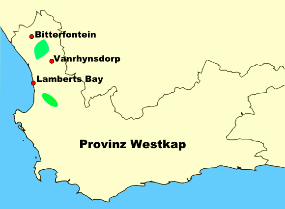 Verbreitungskarte der Pflanzengattung Diplosoma(nach Hartmann 2001, Band 1, S. 218)